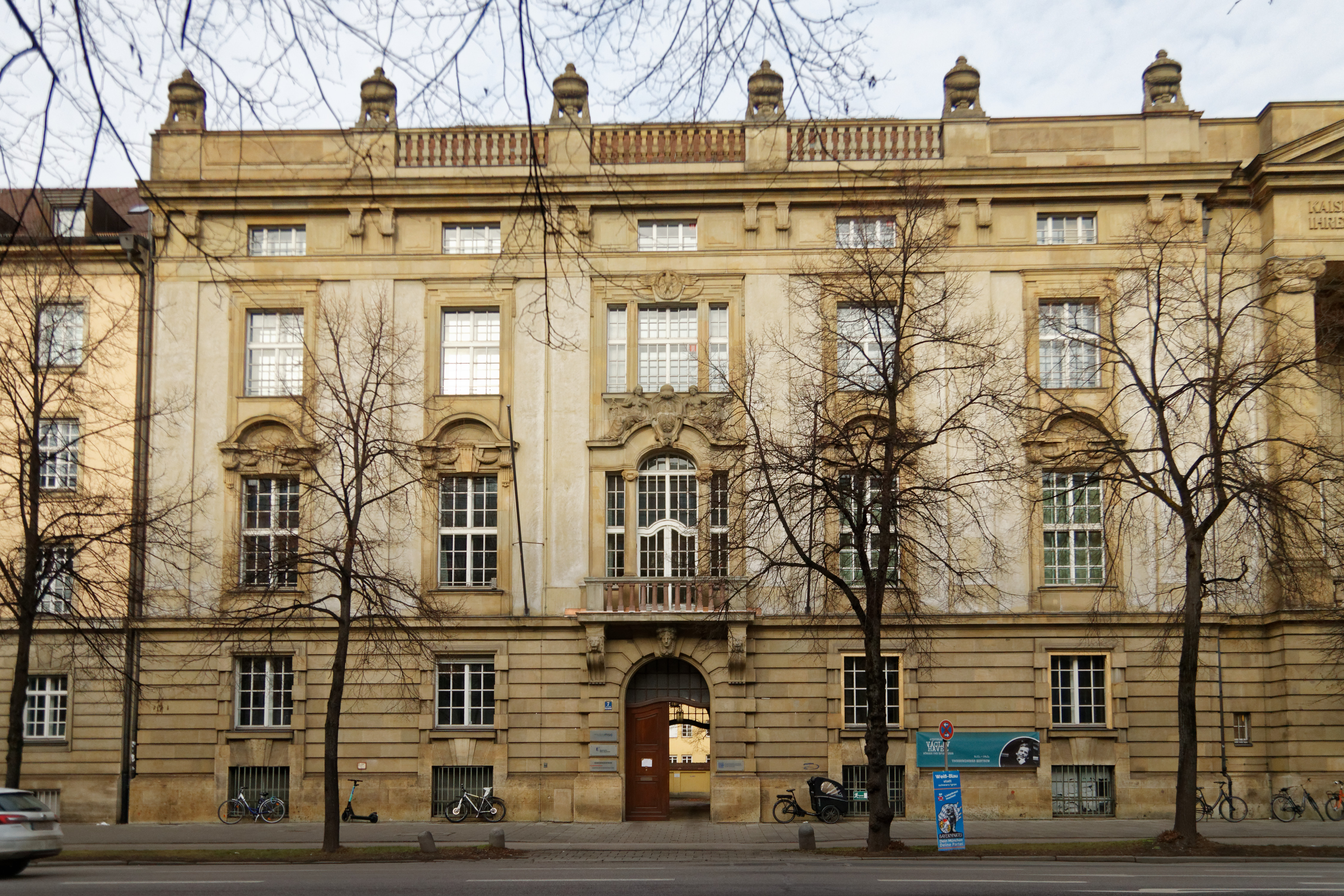 ehemalige preußische Gesandschaft in der Prinzregentenstraße 7 in München